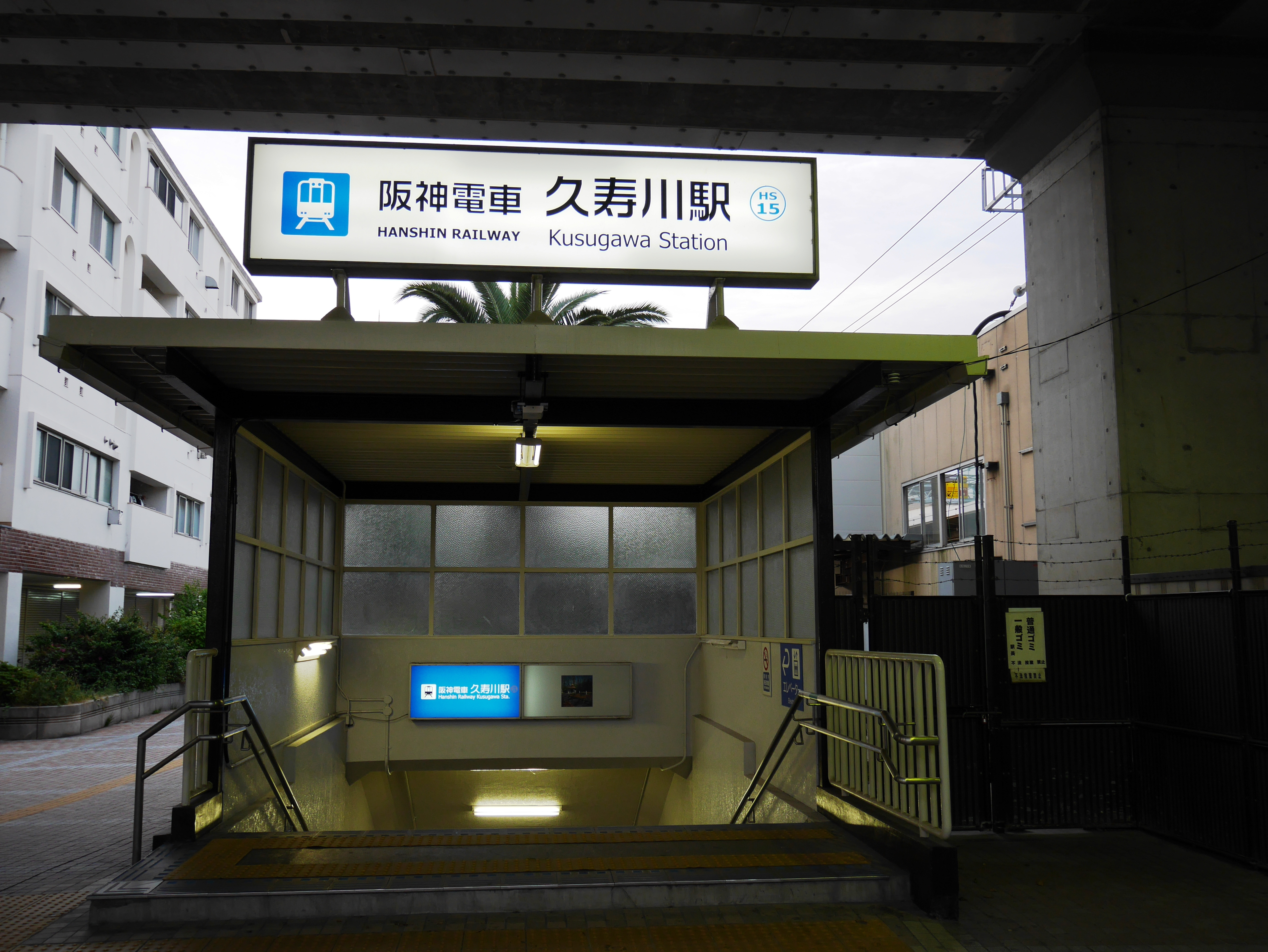 阪神久寿川駅（北口）